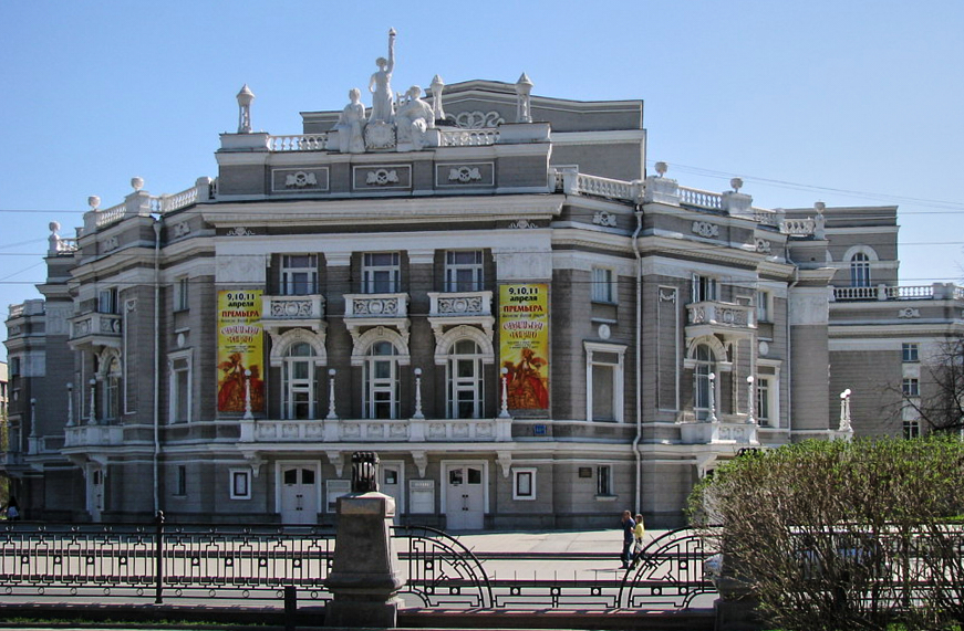 Здание Екатеринбургского театра оперы и балета. 1912 год - стиль модерн. Вместительность зрительного зала - 1200 мест.